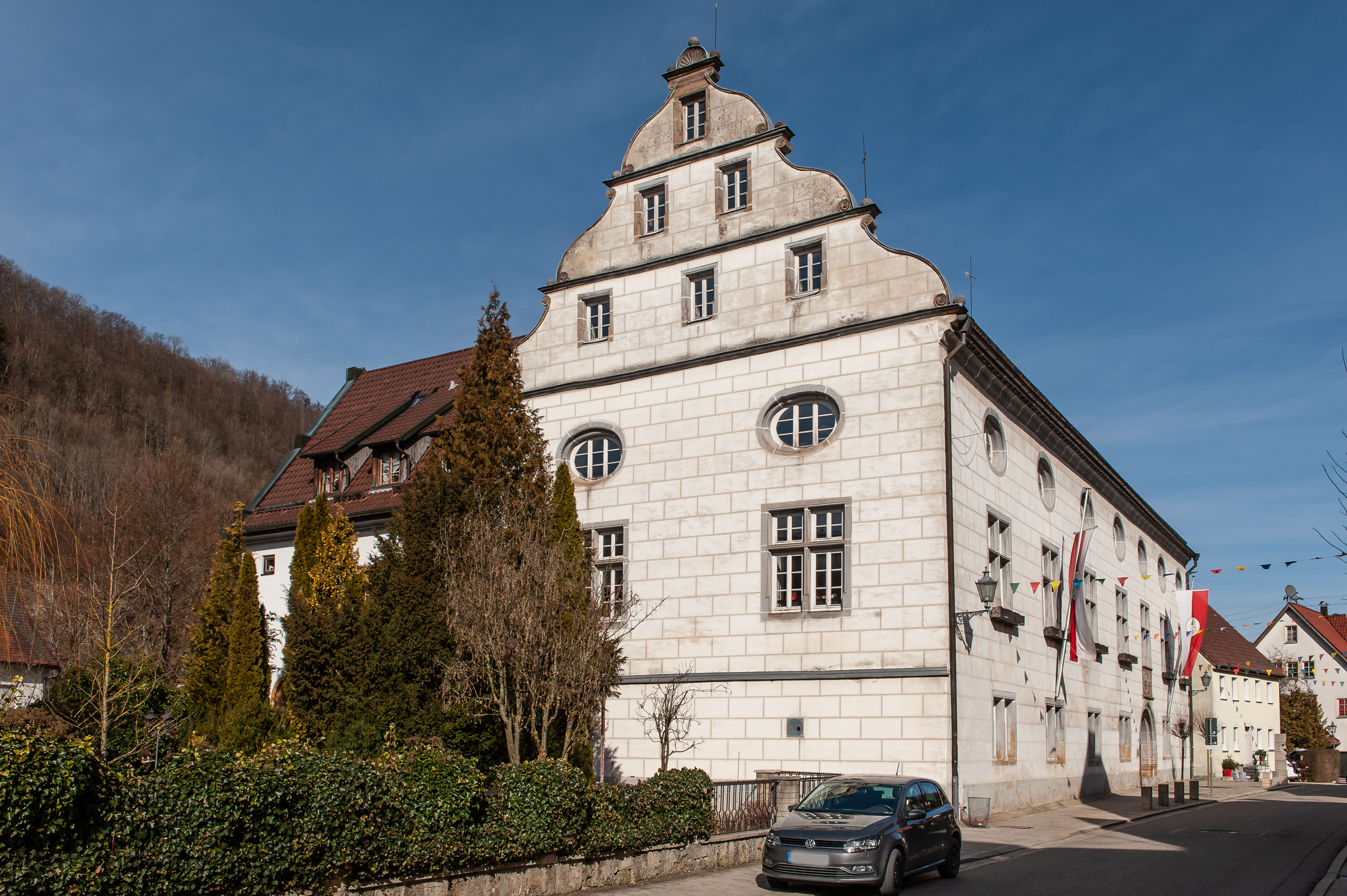 Wiesensteig, Kreis Göppingen. Helfensteiner Schloss